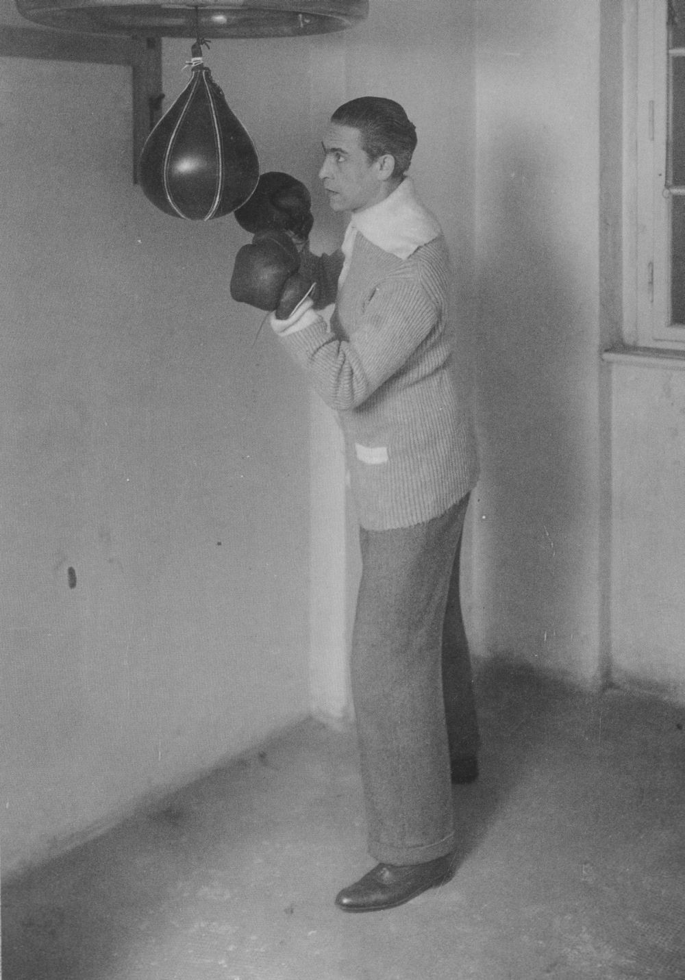 Ernst Deutsch, am Punchingball in seiner Wohnung in der Bendlerstraße 8.